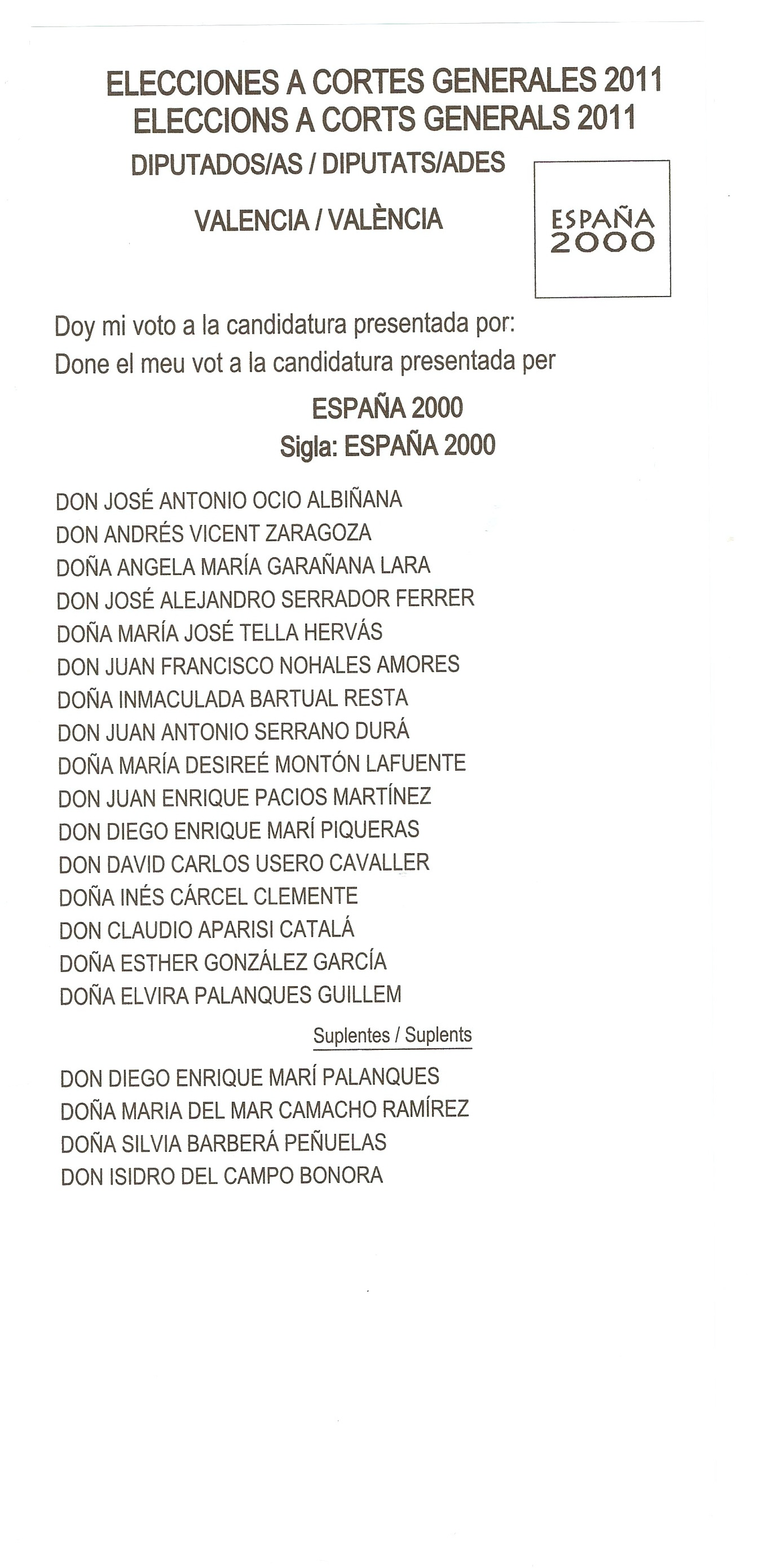 Papeleta de España 2000 por Valencia al Congreso en 2011.